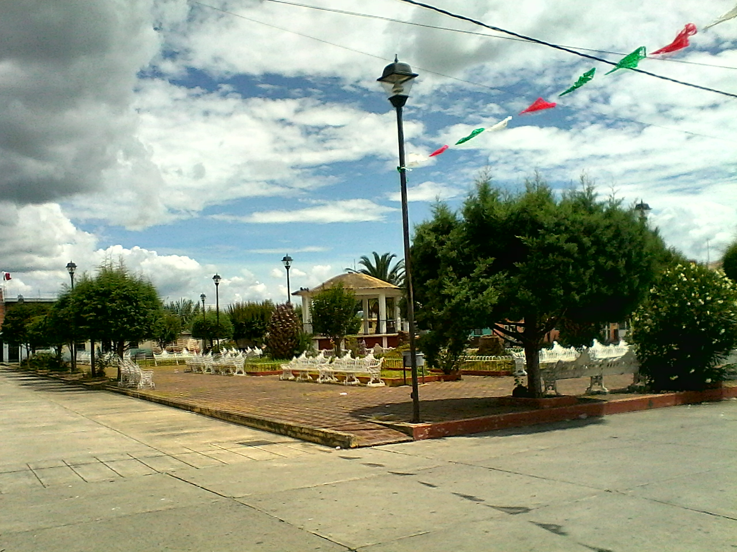 Plaza principal de la comunidad de Cantabria mpio. Zacapu, mich